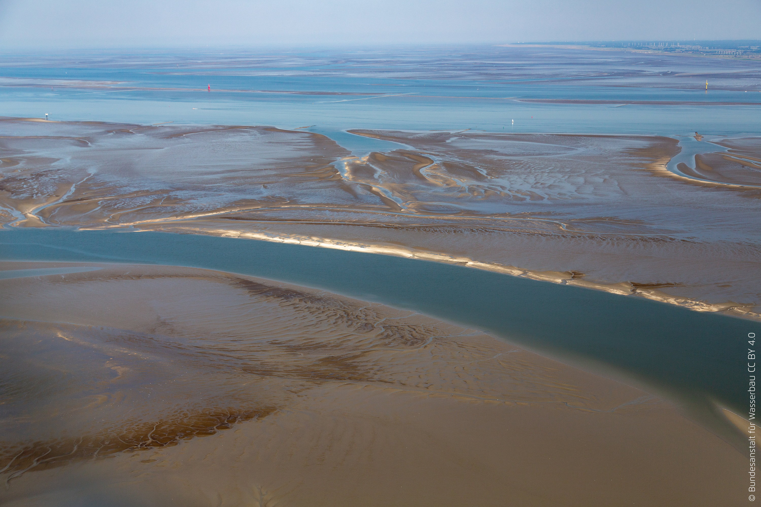 Luftbild der Außenweser